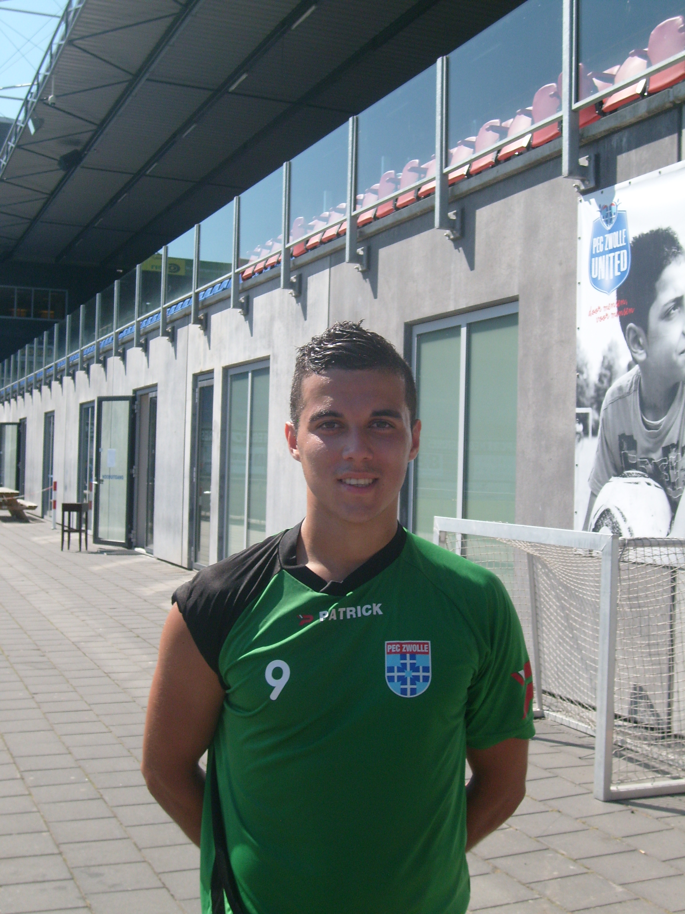 Mustafa Saymak